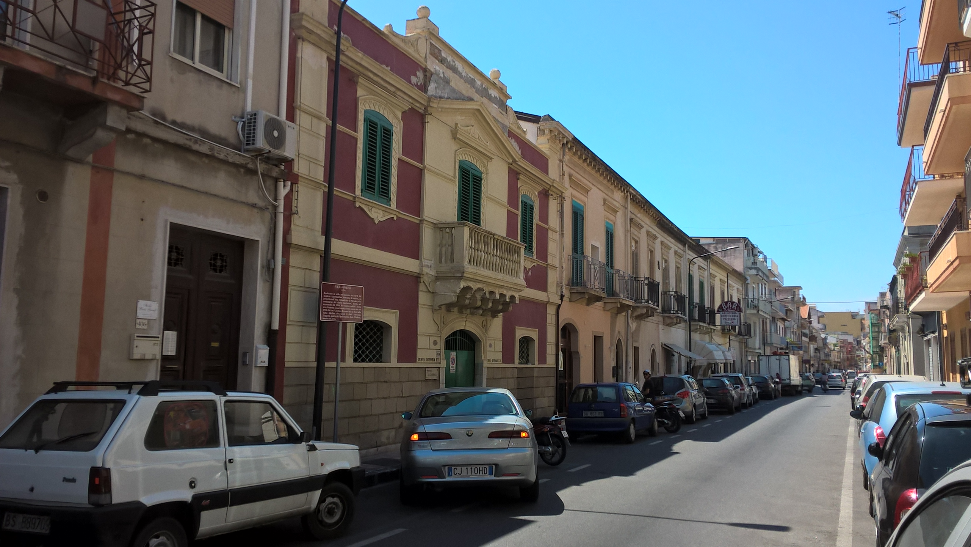 Palazzata Caminiti 1840